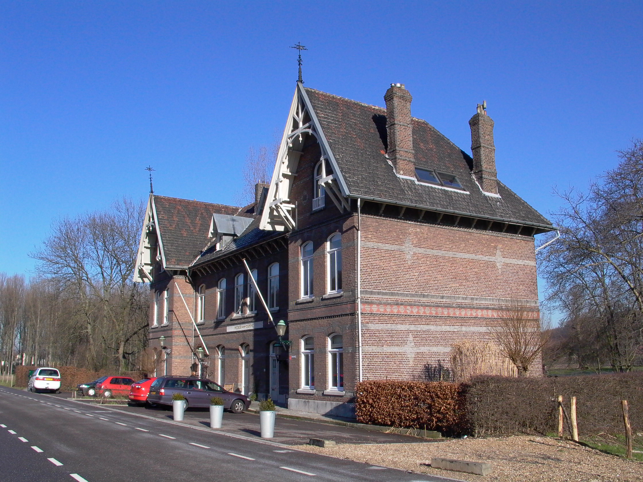 Maastricht, grenskantoor Neercanne in het jekerdal. Foto: Daniel van der Ree, 23 januari 2004